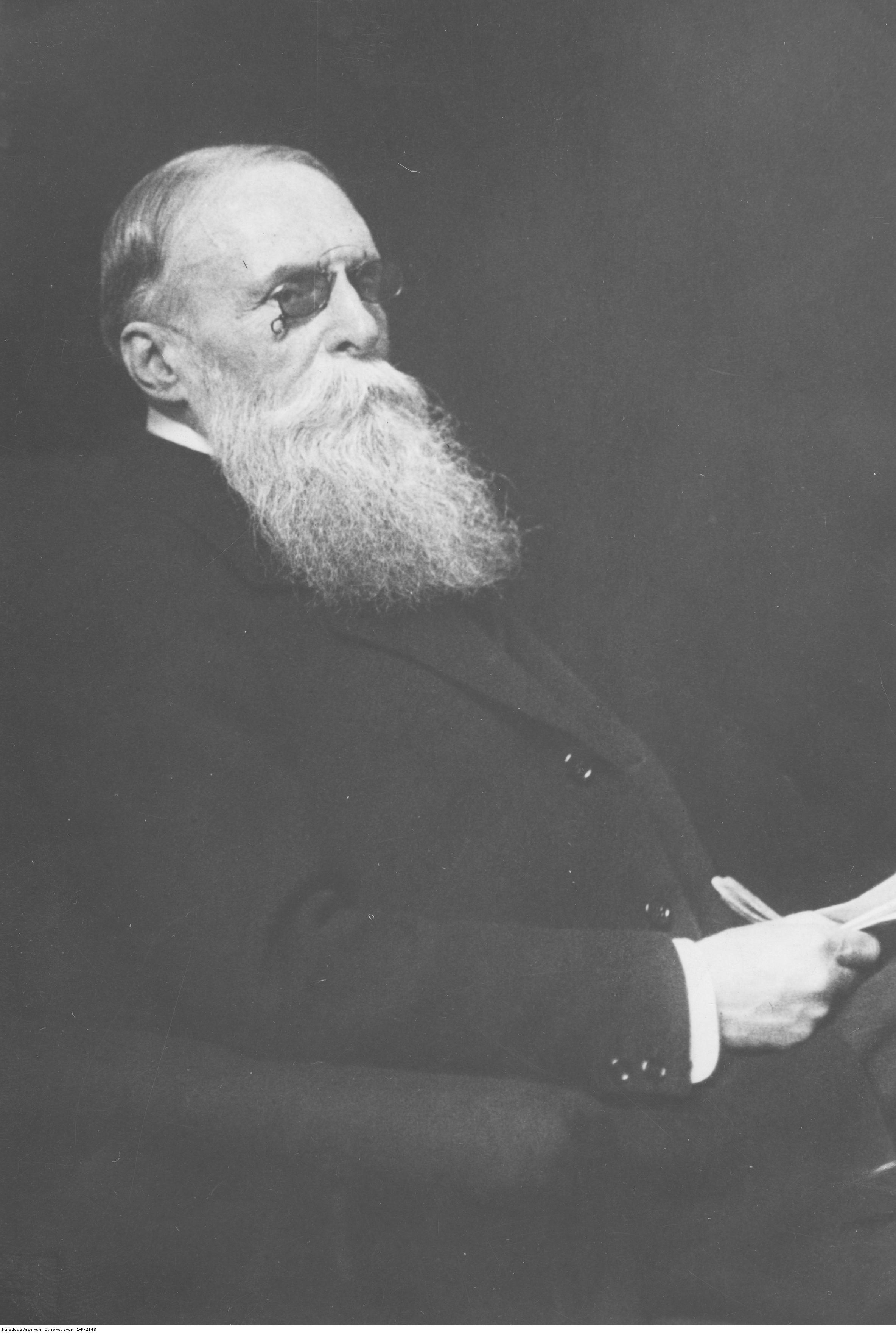 Edward Aleksander Raczyński